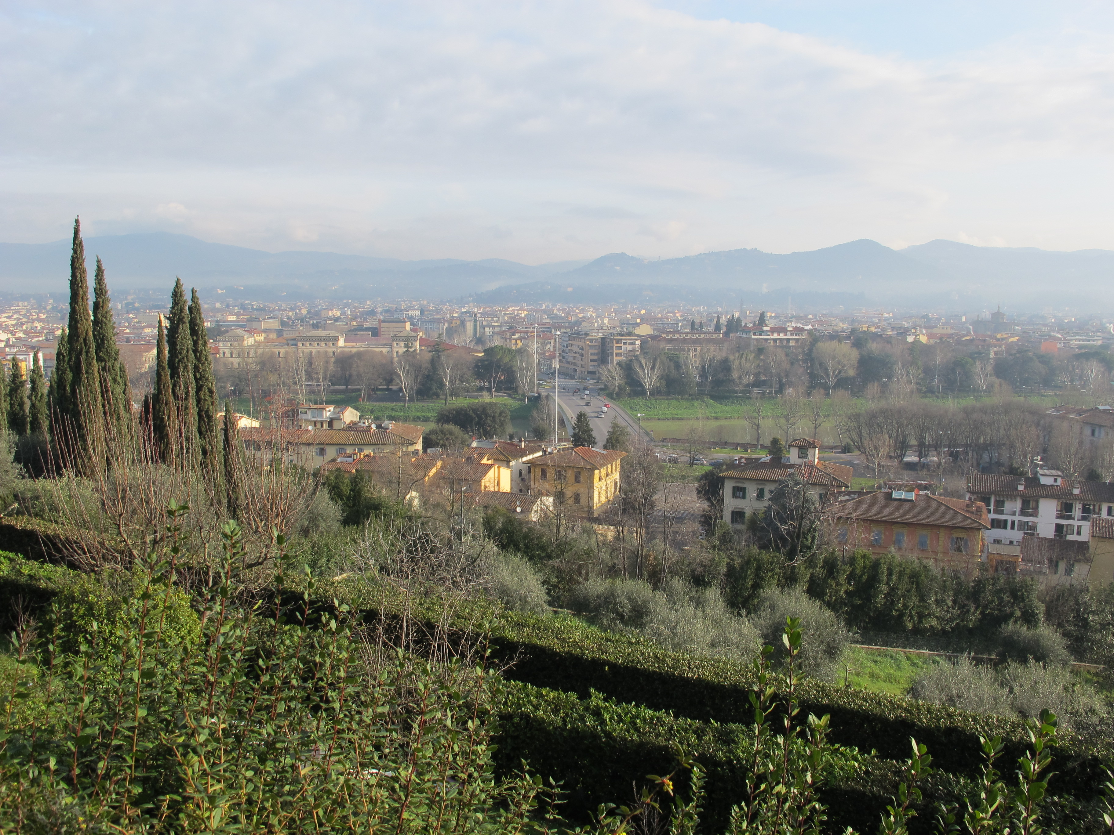 Villa la vedetta, vista 02 bellariva